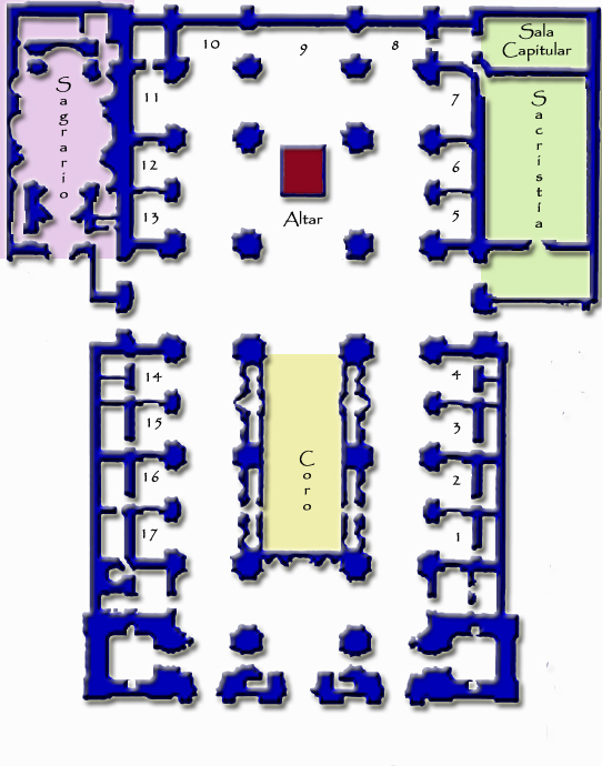 planta - plano Catedral de Jaen ( España )